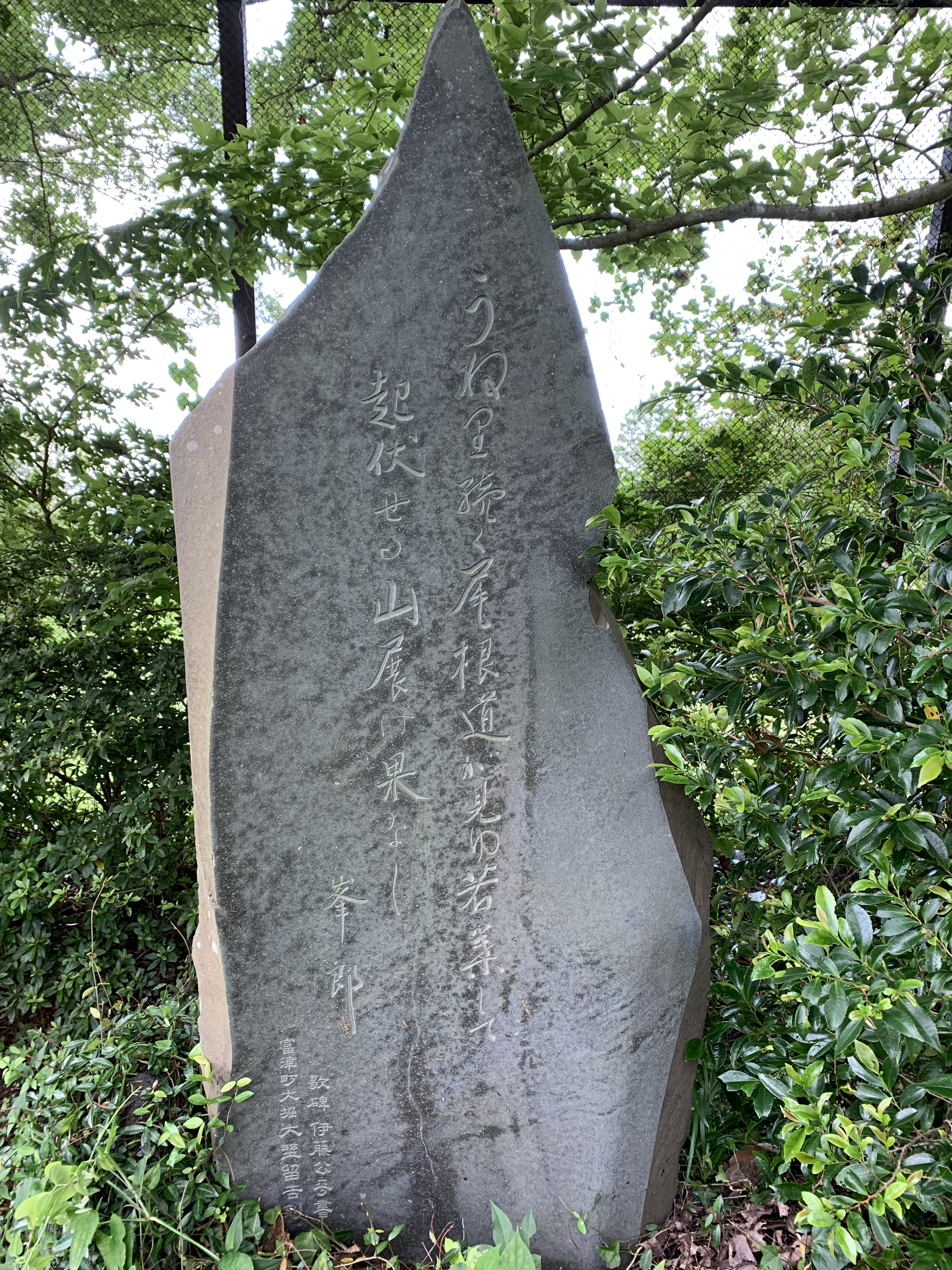 千葉県君津市、鹿野山九十九谷展望公園にある平野峯郎歌碑。1957年建立。（2019年7月撮影）